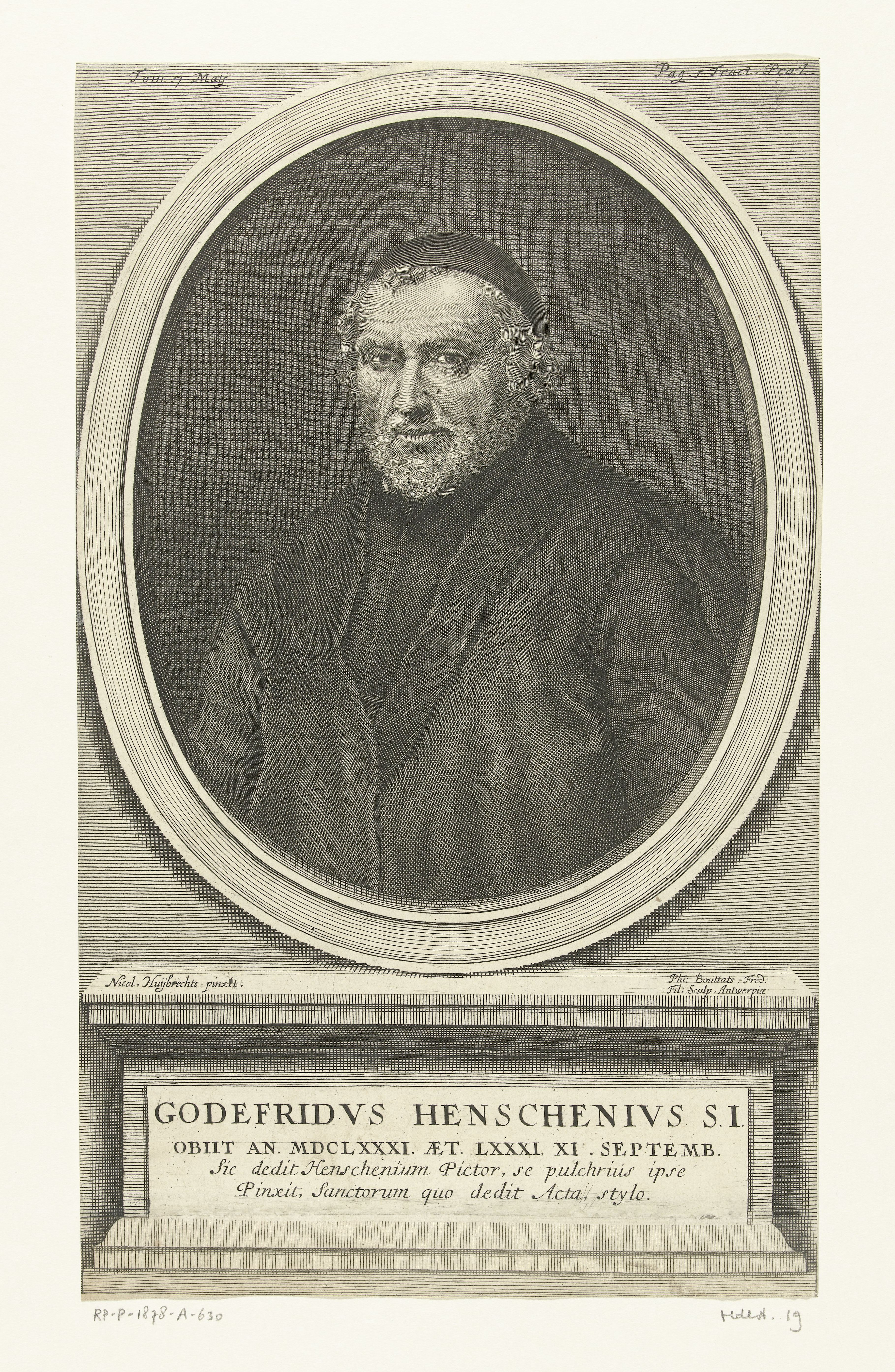 IdentificatieTitel(s): Portret van Godfried HenschenGodefridus Henschenius S.I. (titel op object)Objecttype: prent Objectnummer: RP-P-1878-A-630Catalogusreferentie: Hollstein Dutch 19Opschriften / Merken: verzamelaarsmerk, verso midden onder, gestempeld: Lugt 2228Omschrijving: Portret in ovale lijst van Godfried Henschen (Godefridus Henschenius), jezuiet en mede-oprichter van de Bollandisten. Buste naar links. Hij draagt een zwarte soutane. De prent heeft een Latijns onderschrift.VervaardigingVervaardiger: prentmaker: Philibert Bouttats (I) (vermeld op object)naar schilderij van: Nicolaes Huybrechts (vermeld op object)Datering: 1664 - ca. 1731Fysieke kenmerken: gravureMateriaal: papier Techniek: graveren (drukprocedé)Afmetingen: blad: h 320 mm × b 193 mmOnderwerpWie: Godfried HenschenVerwerving en rechtenVerwerving: aankoop 7-jan-1878Copyright: Publiek domein